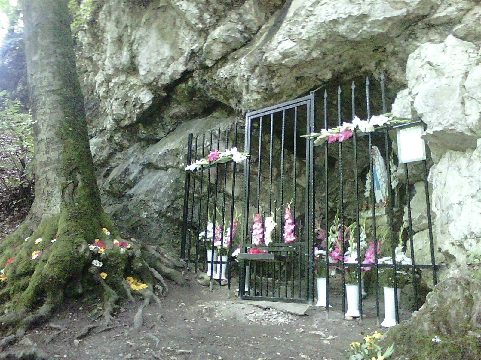 A feldíszített Várgesztesi Szent Bernadett emlékhely (szokásos helyi elnevezése szerint a Lordusz) a zarándoklat vasárnapján.